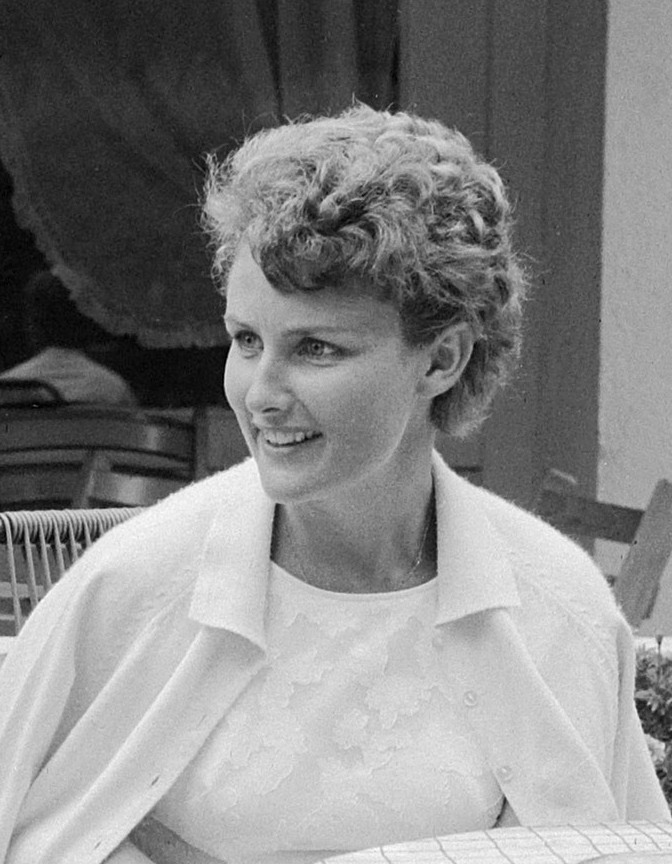 Tennis in Hilversum in het restaurant, Lesley Turner